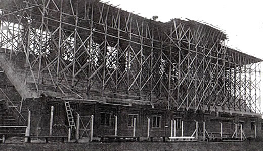 Es una foto anterior a 1924 del techo de la platea del Estadio juan Carlos Zerillo.